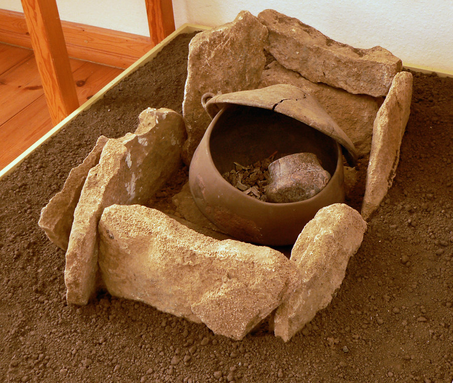 Steinkistengrab aus Rogenstein mit Urne und Deckschale, kleinem Beigefäß als Tasse und Leichenbrand eines 50 bis 60-jährigen Mannes von 1,73-1,74 Meter Größe vom Gräberfeld von Beierstedt, freigelegt 2008, ausgestellt im Heeseberg-Museum in Watenstedt